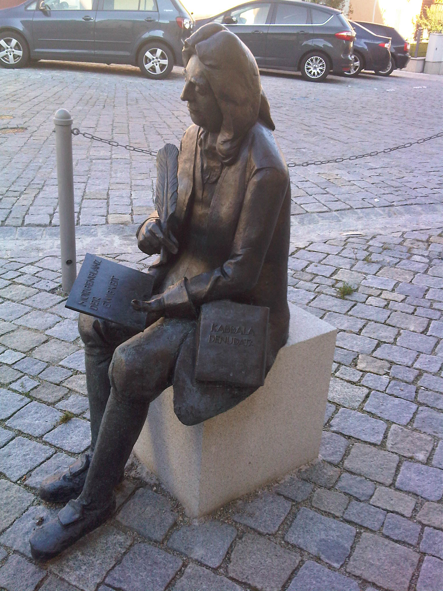 Skulptur Christian Knorr von Rosenroths, gestaltet vom Künstler Peter Kuschel